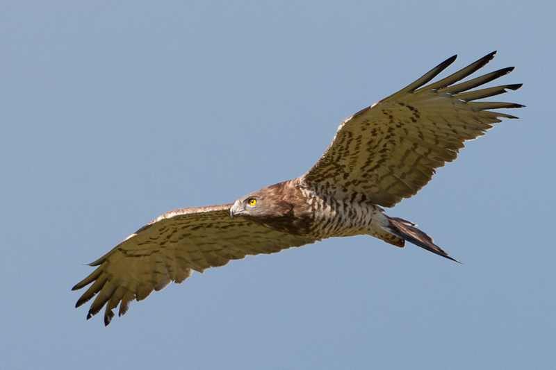 Aguila Culebrera Circaetus gallicus. Punta Carnero, Andalusia, Spain.